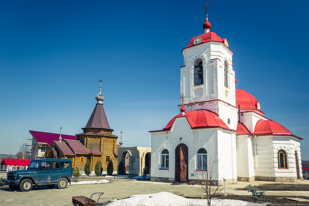 Заволжский Свято-Ильинский монастырь. Восстановленный бывший приходский храм во имя пророка Илии - кирпичная церковь с колокольней, построенная в 1860—1890 годах. Самарская область, Россия